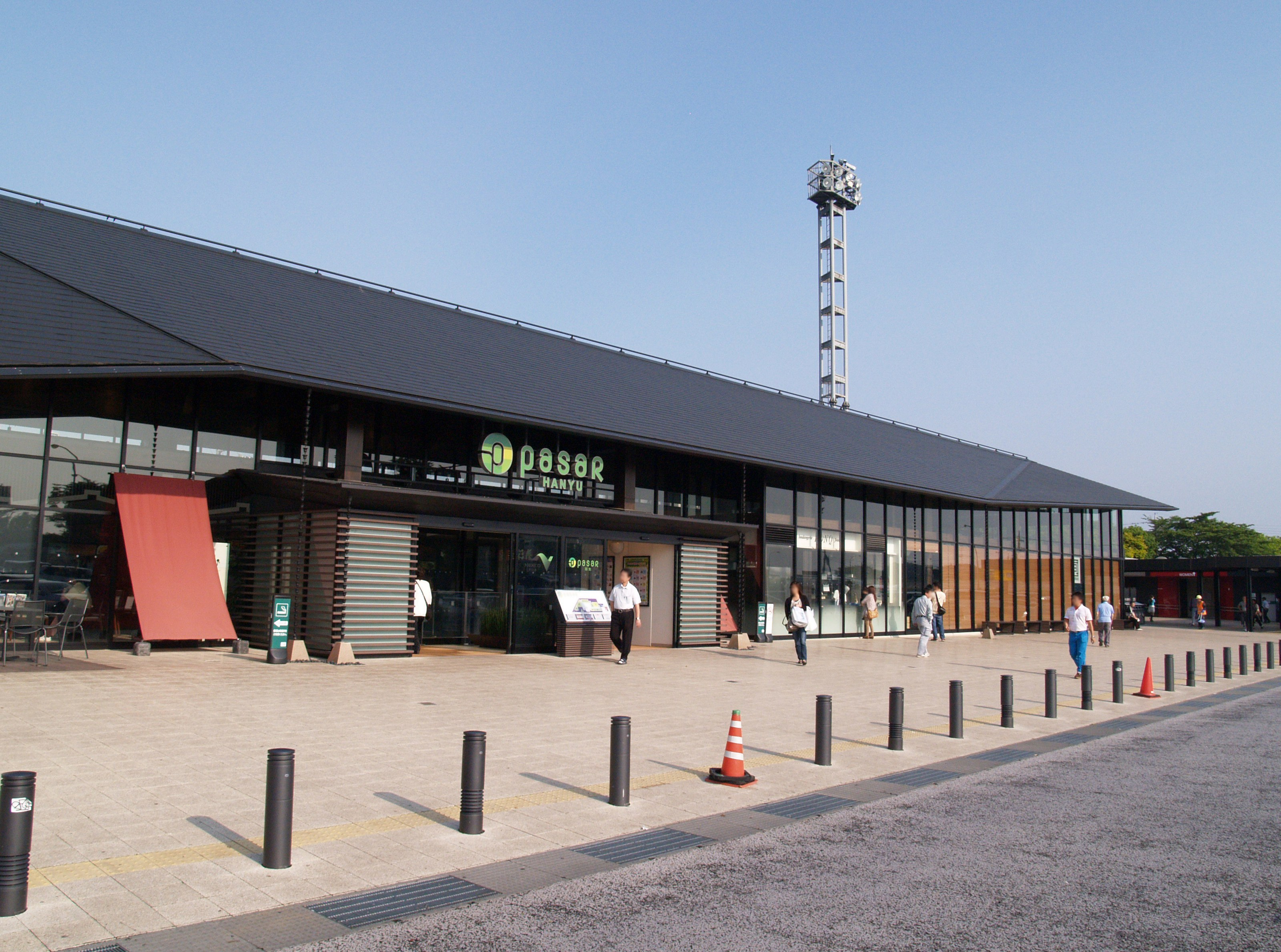 羽生パーキングエリア下り線施設「Pasar羽生」